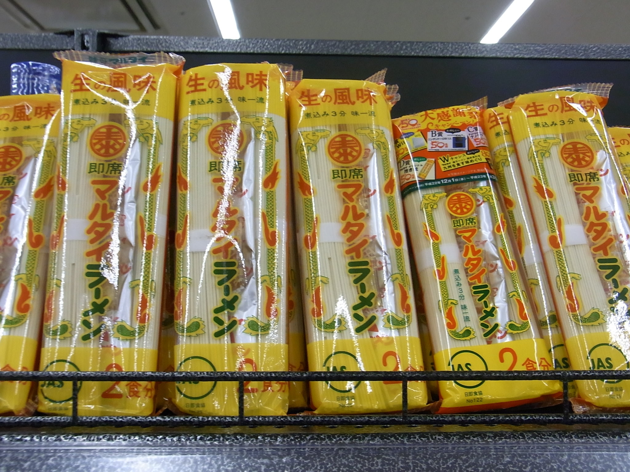 マルタイラーメン 2011年1月撮影 てかってるので他の写真があったら差し替えてください